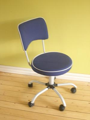 Blå kontorsstol med vita kanter. tagen av mig själv.